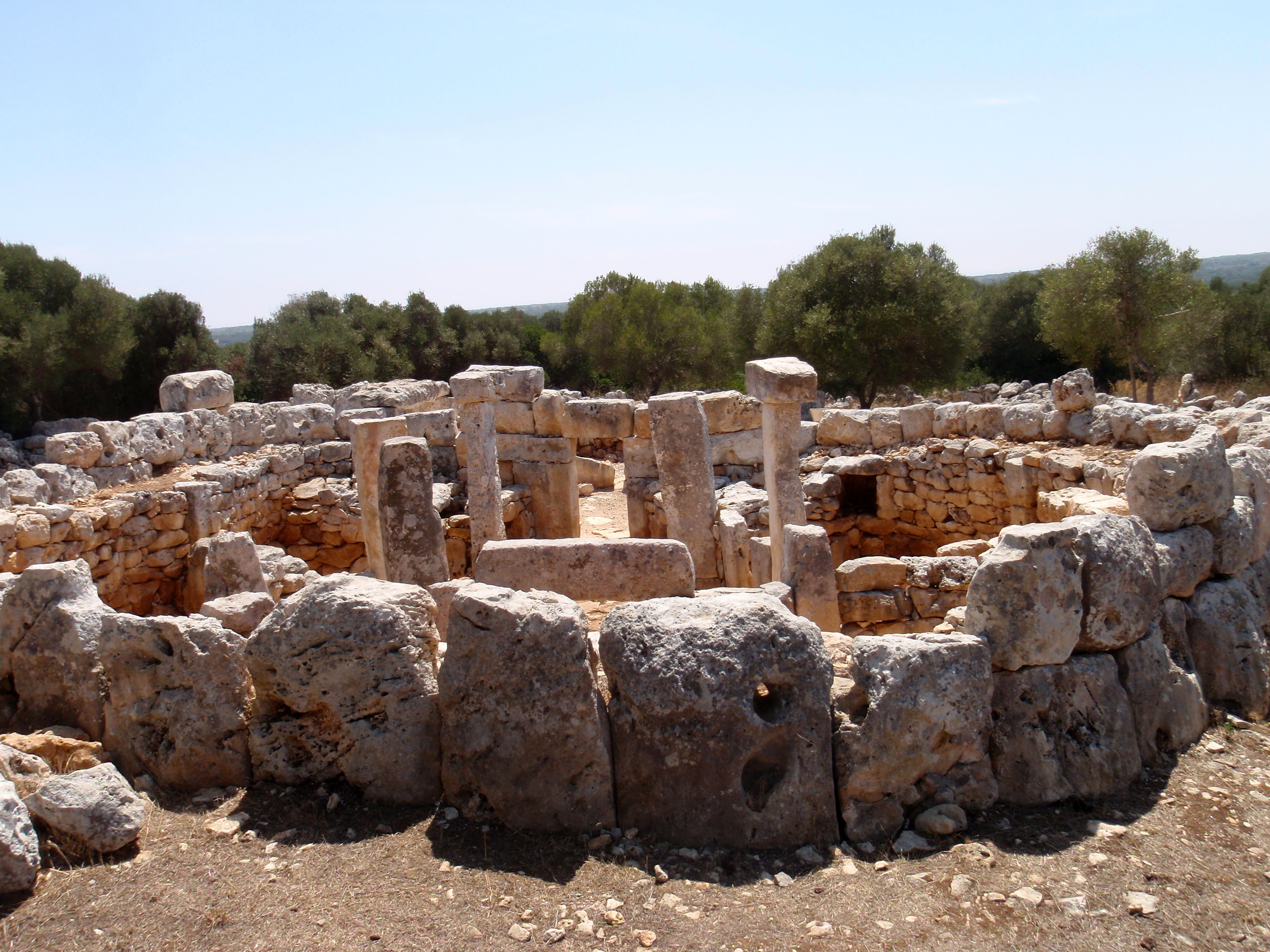 Torre d'en Gaumés